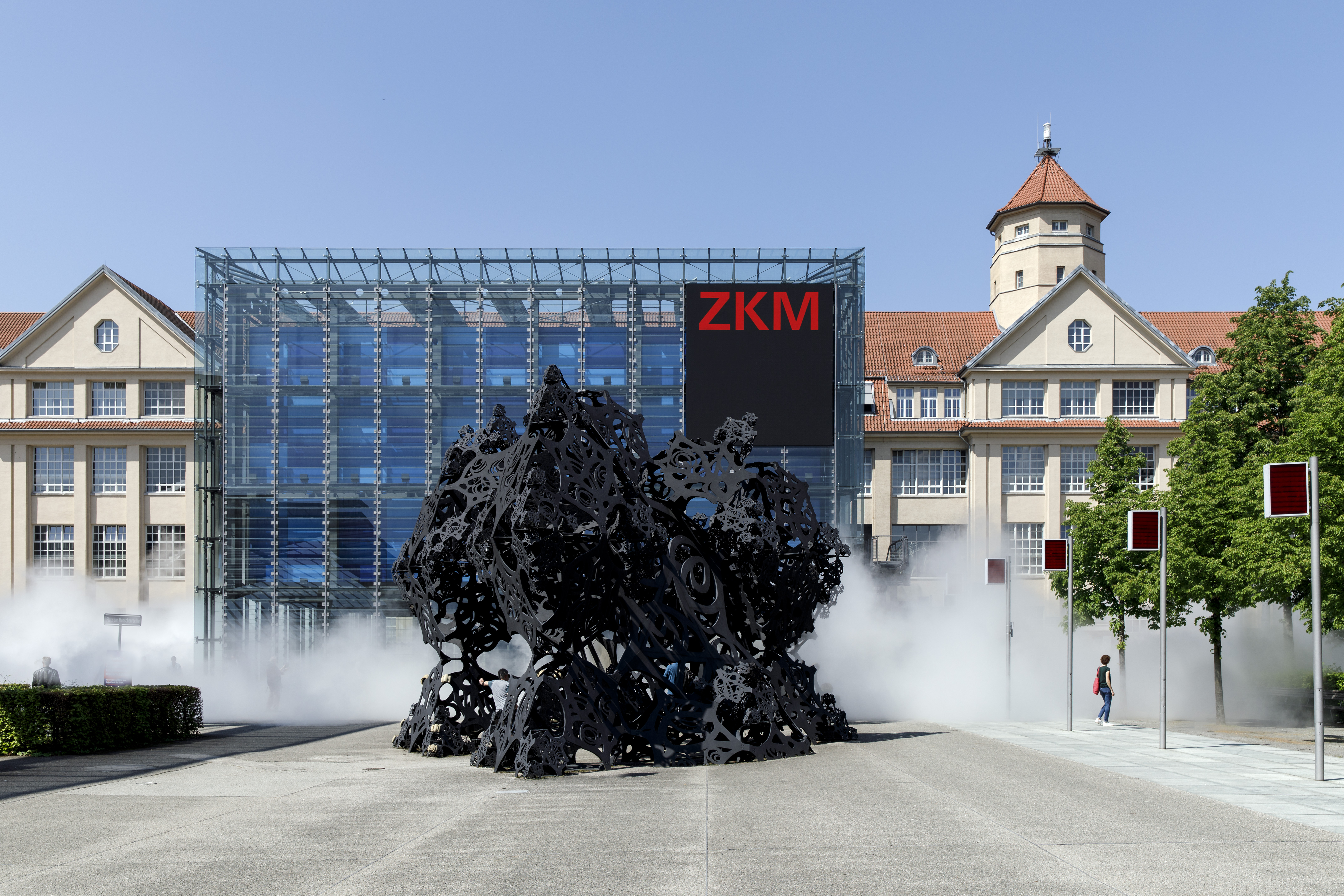 Zentrum für Kunst und Medien in dichte Nebelwolken. Sie ist Teil der Ausstellung »Negativer Raum. Skulptur und Installation im 20./21. Jahrhundert«.